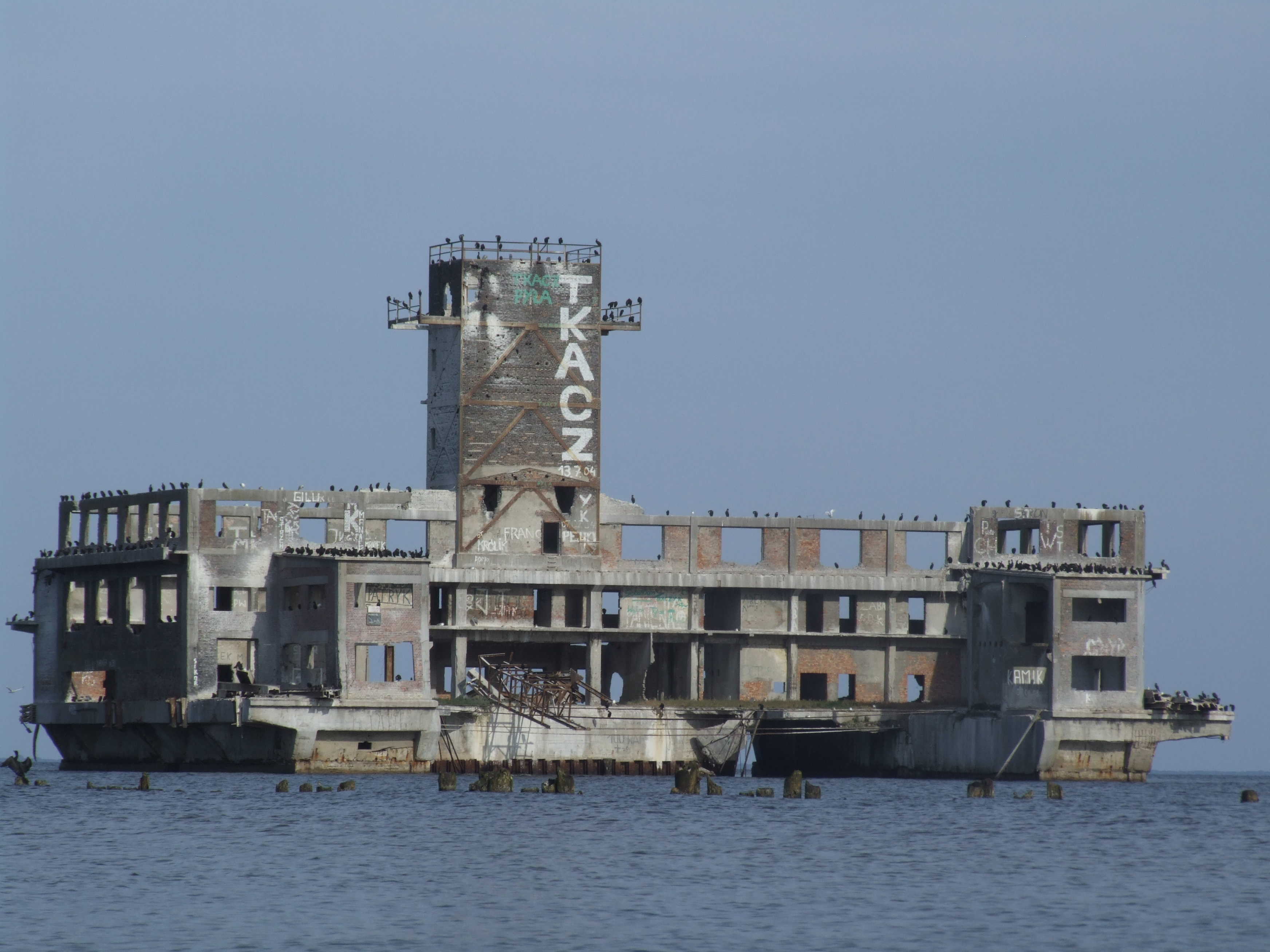 Torpedownia w Gdyni, Babie Doły